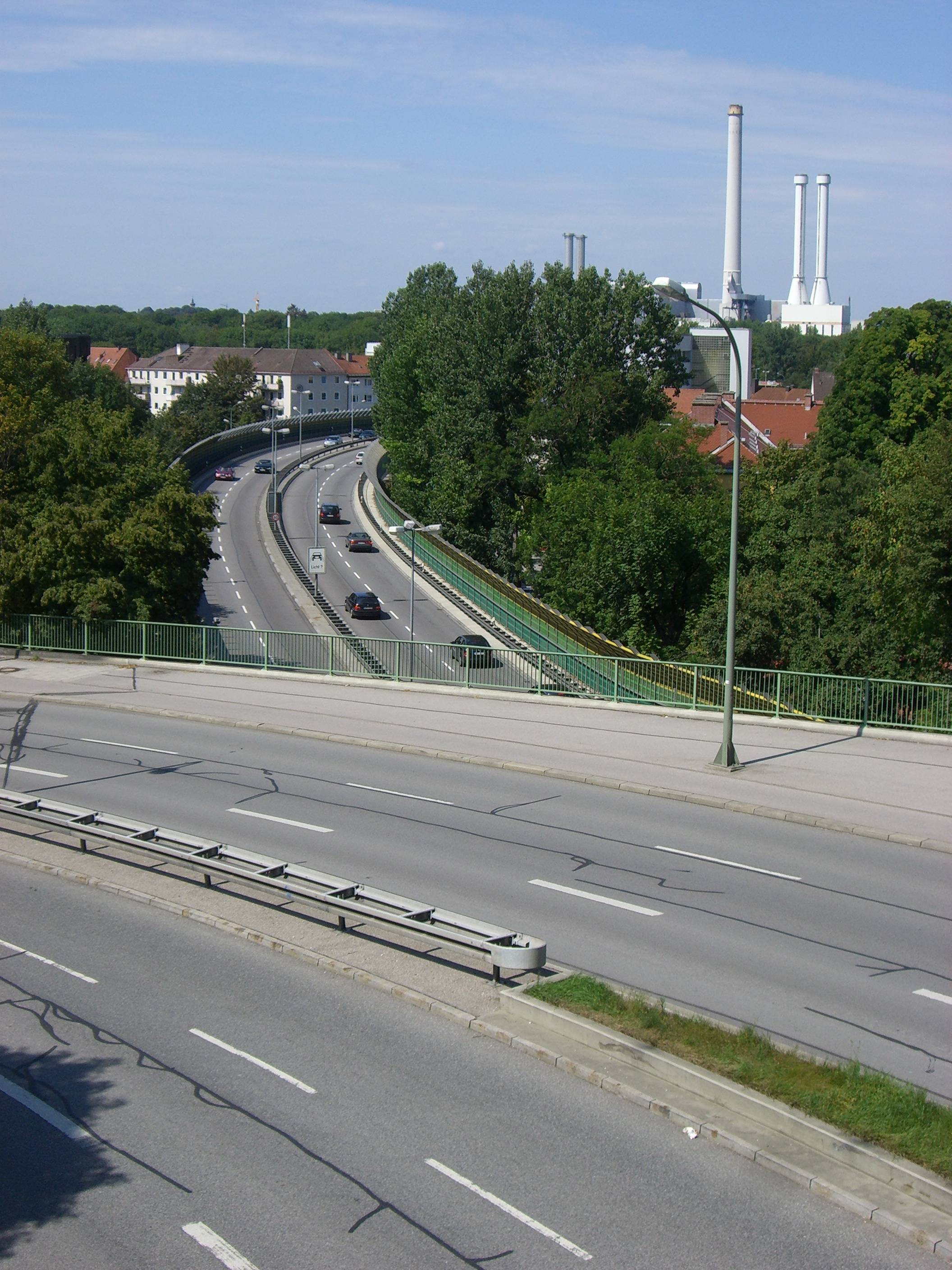 München - Mittlerer Ring - Candidberg